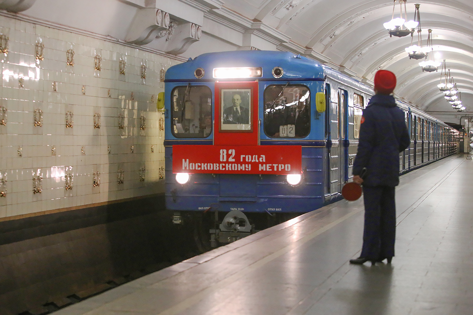 Электропоезд метро Еж3/Ем508Т на параде поездов в честь 82-летия Московского метро